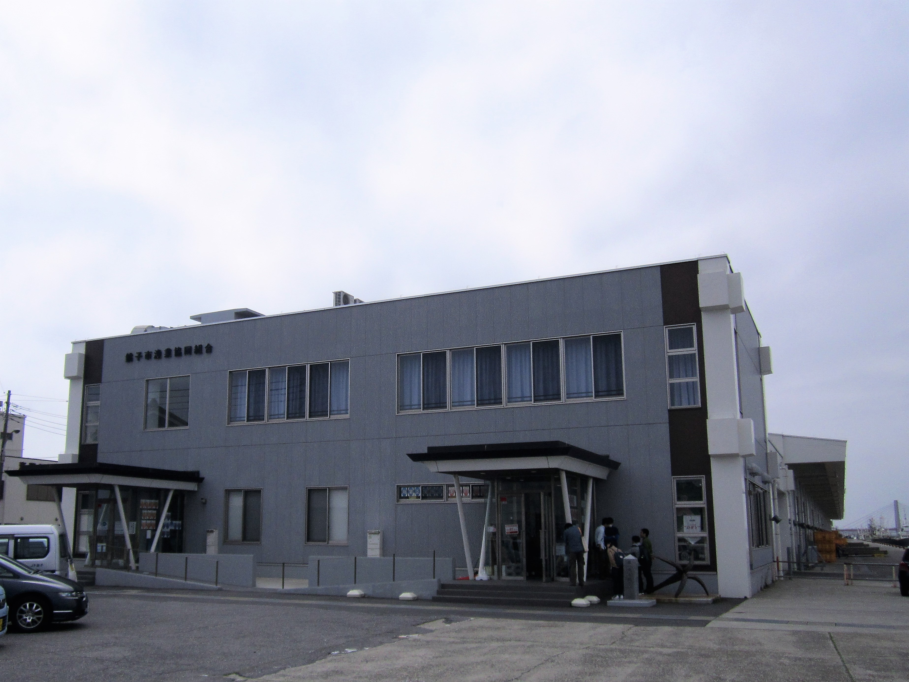 銚子漁港第一卸売市場（中央市場） Canon PowerShot A2200